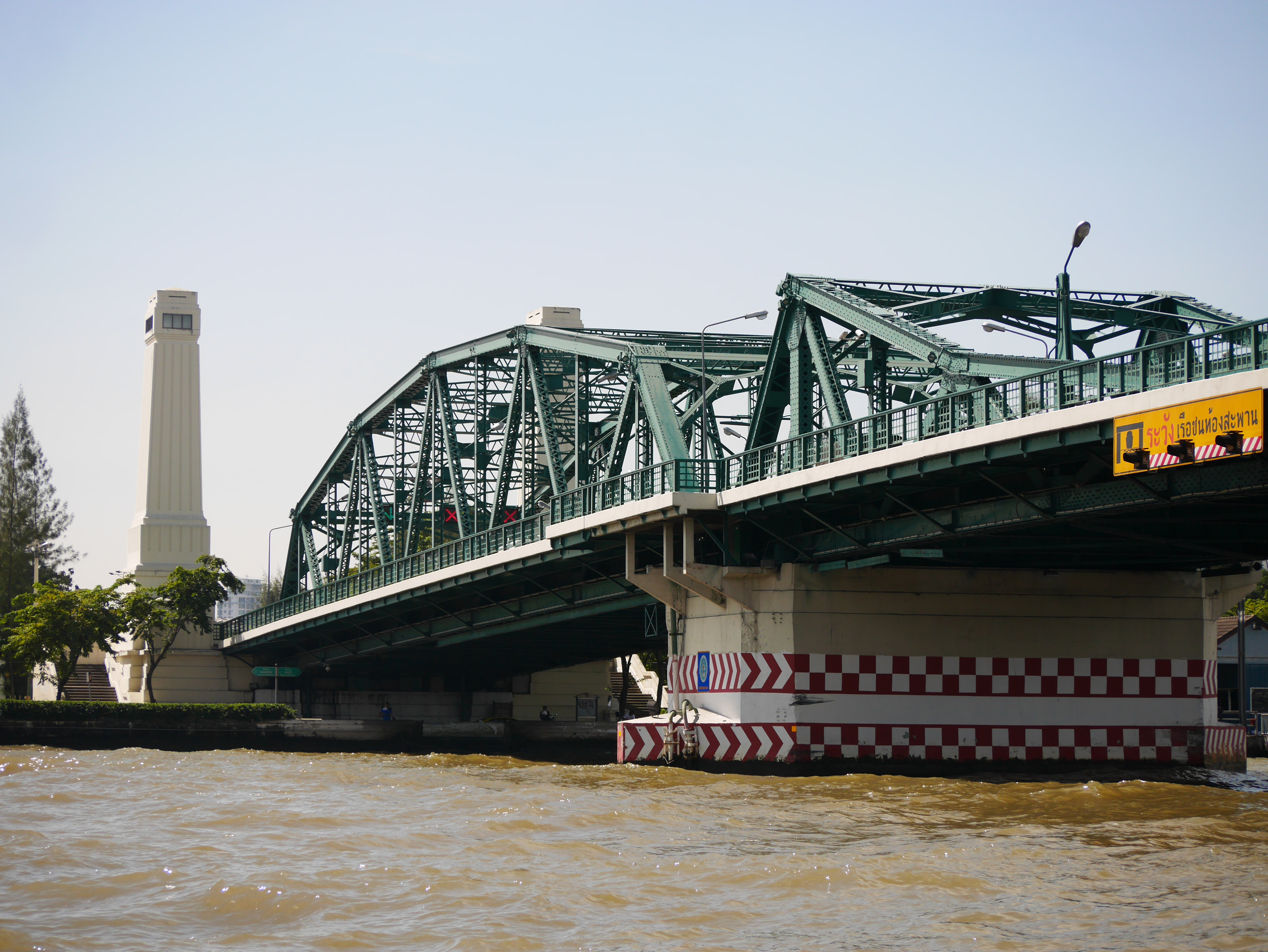 สะพานพระพุทธยอดฟ้า เจ้าของบัญชี กสิณธร ราชโอรส เป็นเจ้าของบัญชีเดียวกับ บัญชี Phonlakrit Sunthornphon ของ Facebook บัญชี Tsutomu RIkimi ของ Google และ Panoramio .com บัญชี ซูบารุโยของ กสิณธร ราชโอรส same account holder of Facebook (Phonlakrit Sunthornphon),Google and (Tsutomu RIkimi) and ซูบารุโย at